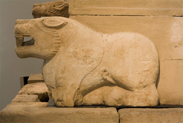 Monumento de Pozo Moro (Sillar) (Cultura ibérica). Número de inventario: 1999-76-A-13.